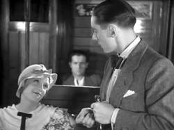 Una scena di "Treno popolare (Matarazzo, 1933)